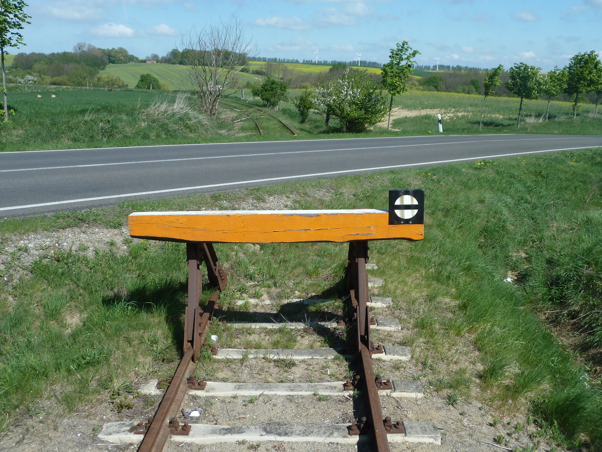 Prenzlauer Kreisbahn, Ende des heute dem Eisenbahnmuseum Gramzow gehörenden Streckenabschnitts zwischen Eickstedt und Schmölln